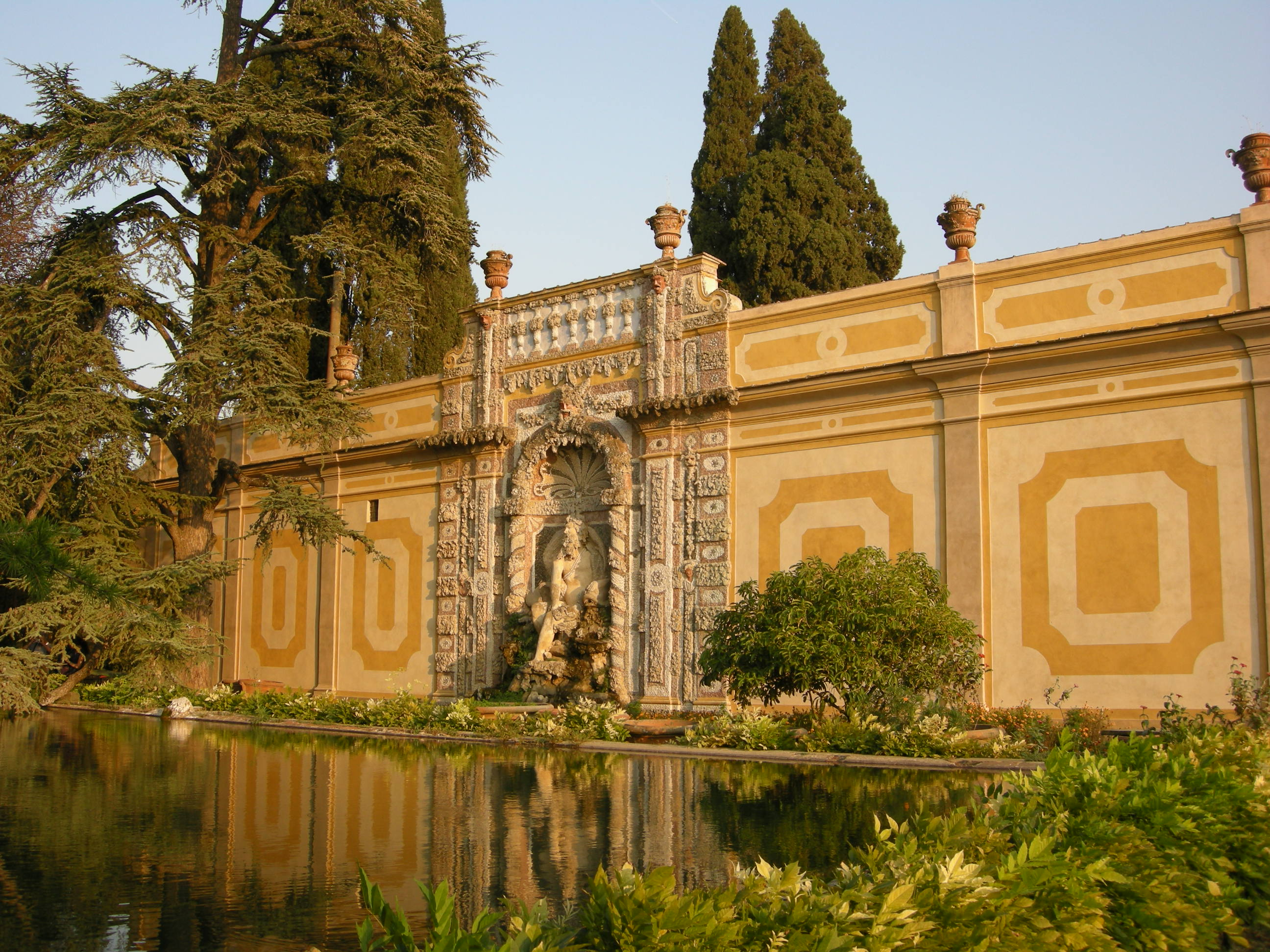 Villa antinori di cigliano, giardino, vasca e fontana